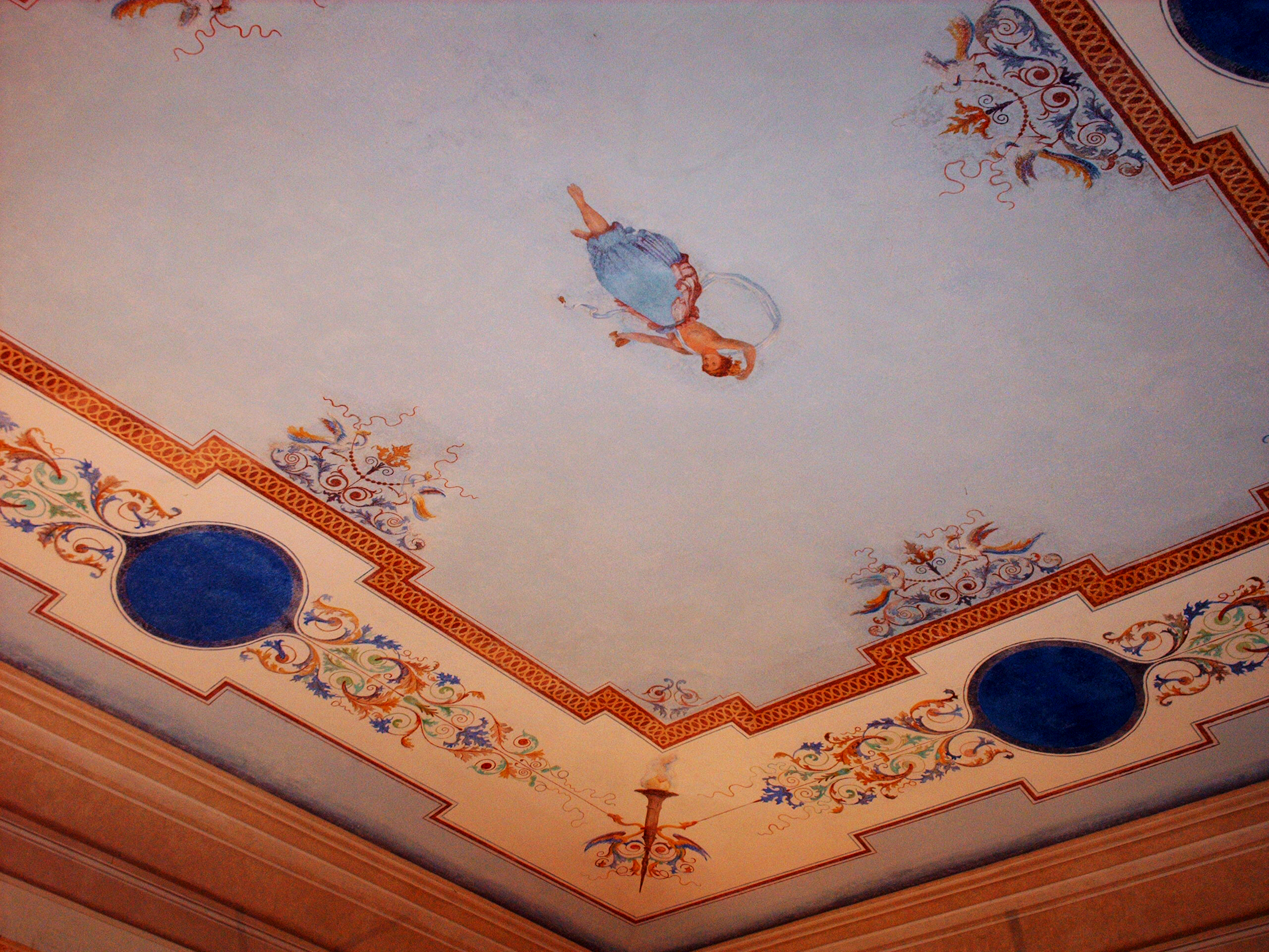 Villa Paolina a VIareggio, decorazione di un soffitto